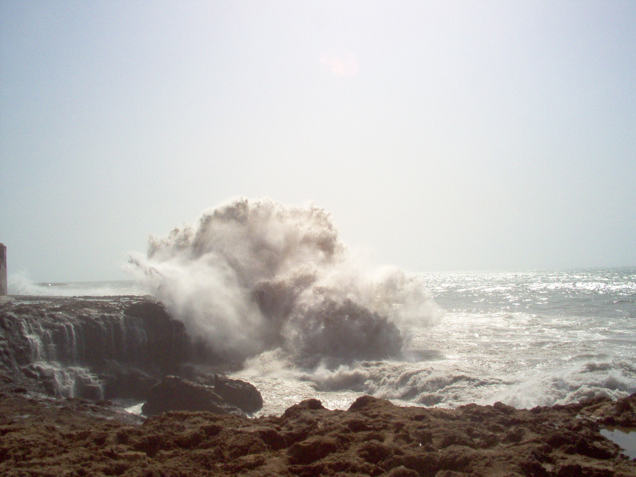 Golven aan de rotskust van Sidi Moussa, Salé